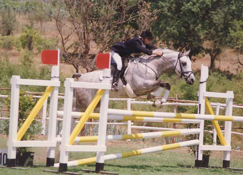 Elena de' Grimani durante una competizione di salto ostacoli, col suo cavallo Azar